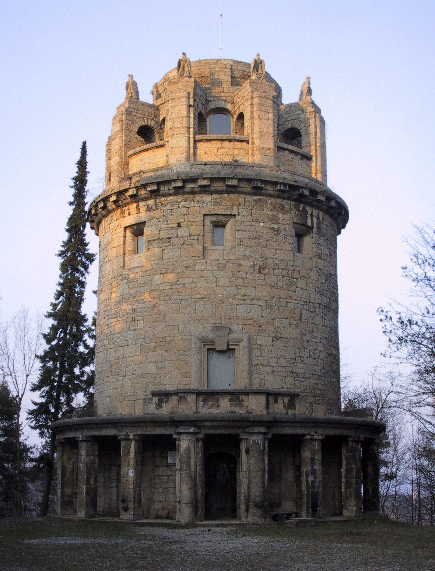 Bismarckturm in Jena